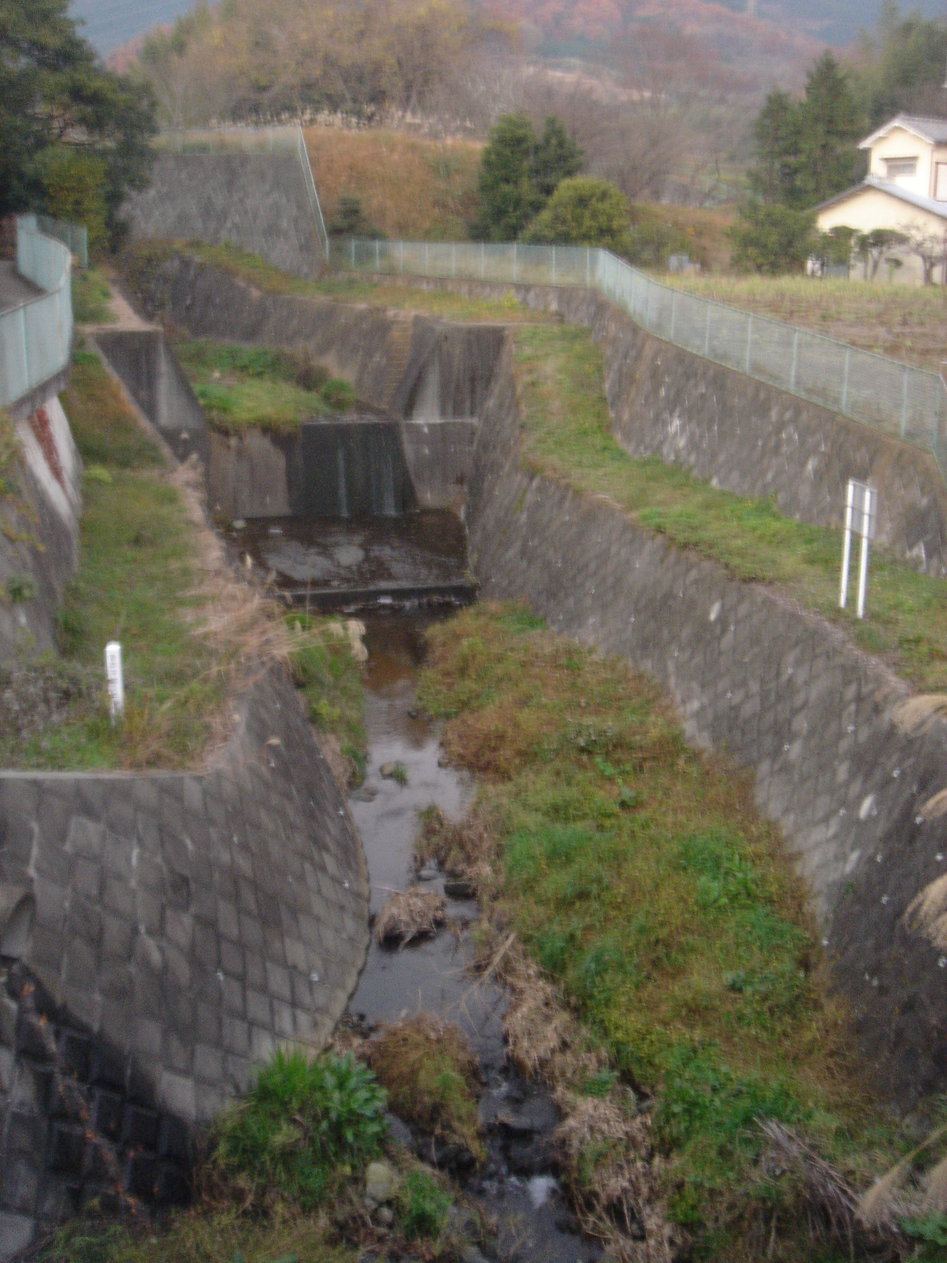 中丸橋から撮影